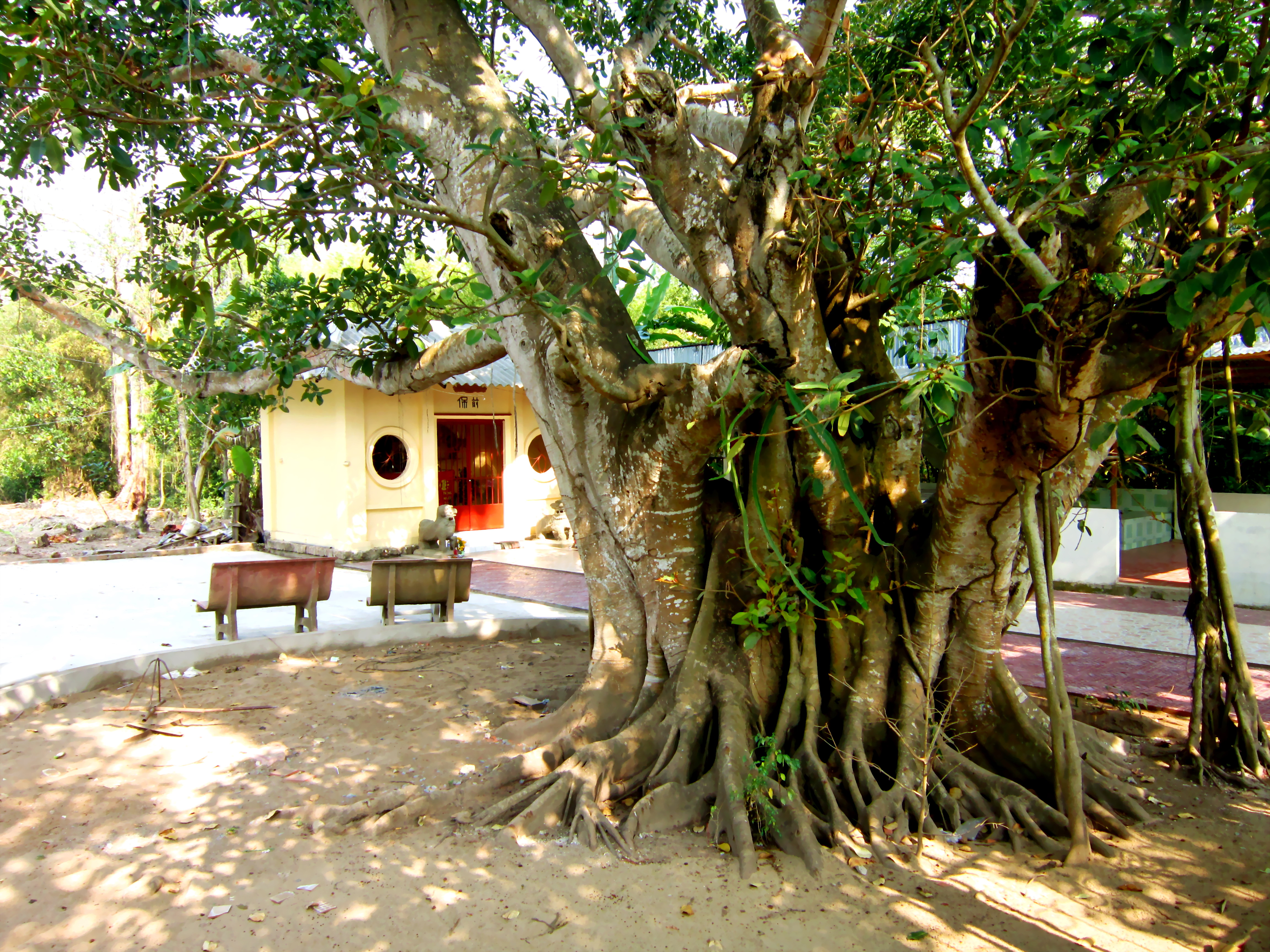 Miếu Gia Long thờ vua Gia Long; hiện ở ấp Hưng Mỹ Tây, xã Long Hưng A , Lấp Vò, Đồng Tháp, Việt Nam.